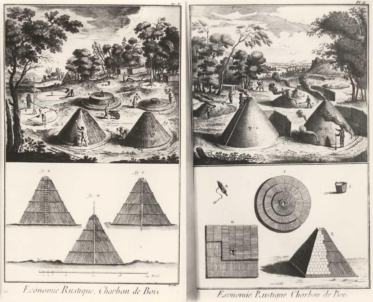 Vyobrazení různých konstrukcí stojatých milířů a ideálních uhlířských pracovišť (placů) ve slavné francouzské Encyklopedii aneb Racionálním slovníku věd, umění a řemesel (1763).